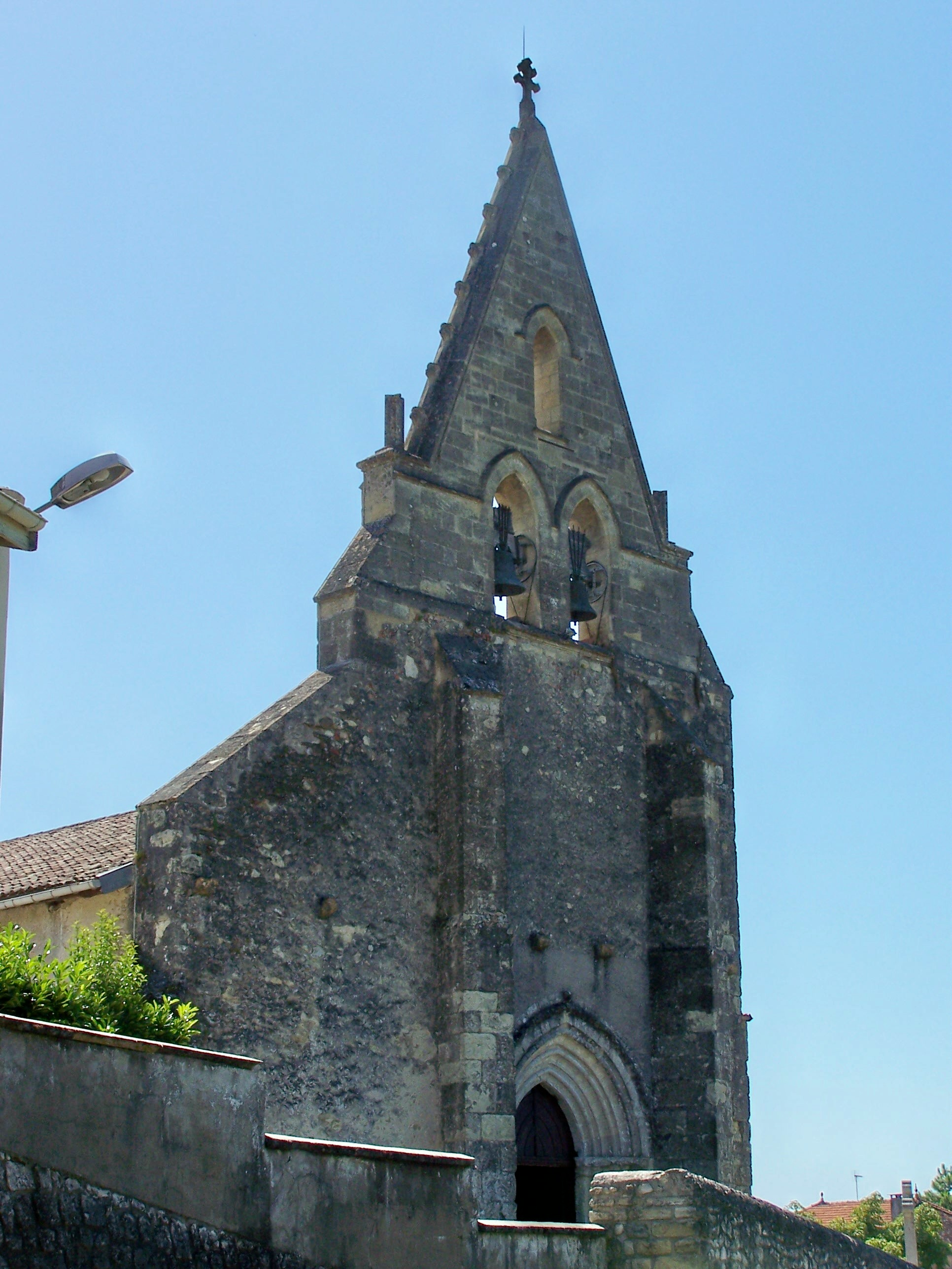 Façade ouest de l'église de Mongauzy, Gironde, France